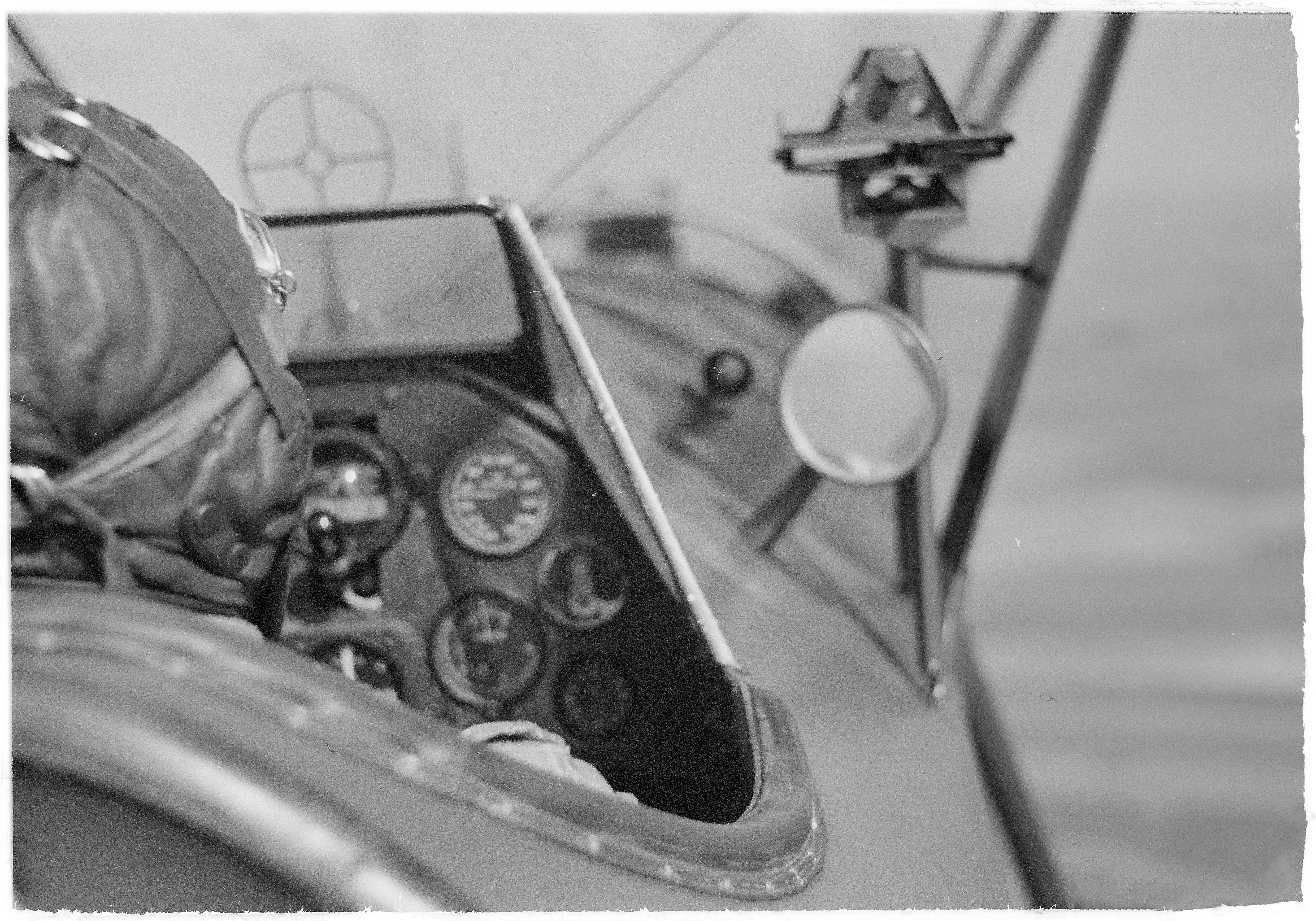 Tuiskun ohjaamosta takaa päin.